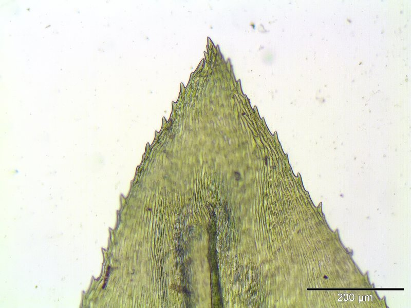 Spitzblättriges Schönschnabelmoos (Eurhynchium striatum), Blattspitze, 125x